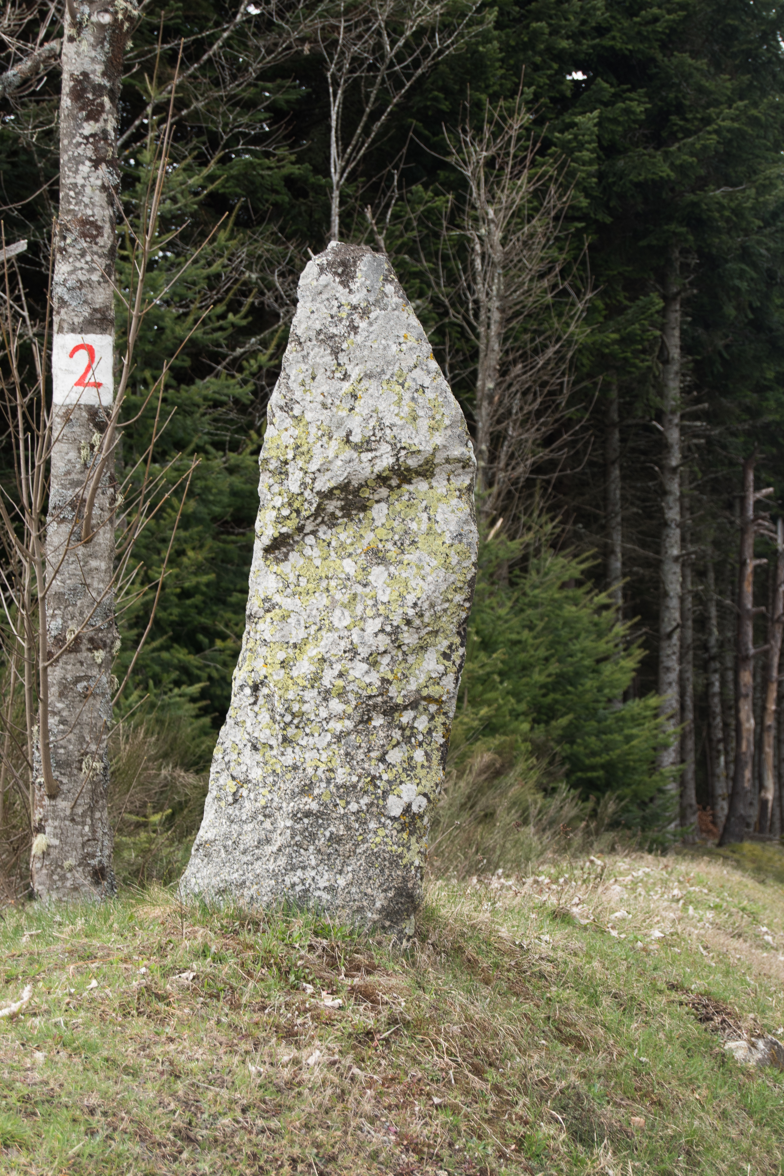 Statue-menhir de Lichessol .